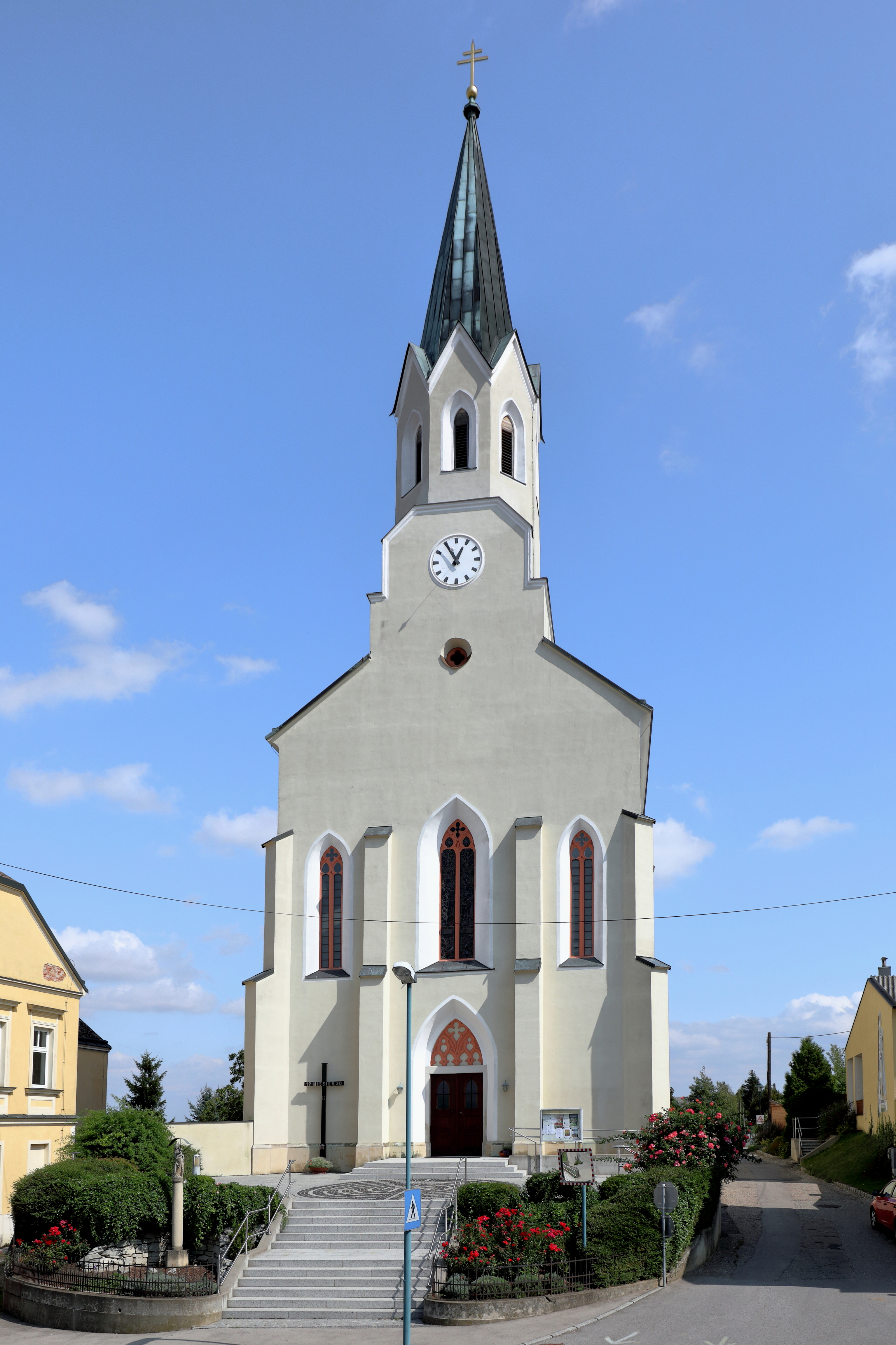 Westansicht der röm.-kath. Pfarrkirche hll. Petrus und Paulus in der niederösterreichischen Gemeinde Unterstinkenbrunn. Die Kirche im einfachen, neogotischen Stil mit eingezogenem Chor, Strebepfeilern und Maßwerkfenstern wurde von 1861 bis 1863 an der Stelle einer kleinen 1736 geweihten Kapelle errichtet.